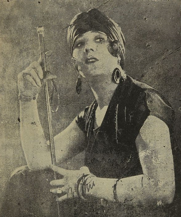 Cristina Montt, actriz chilena, 1926.